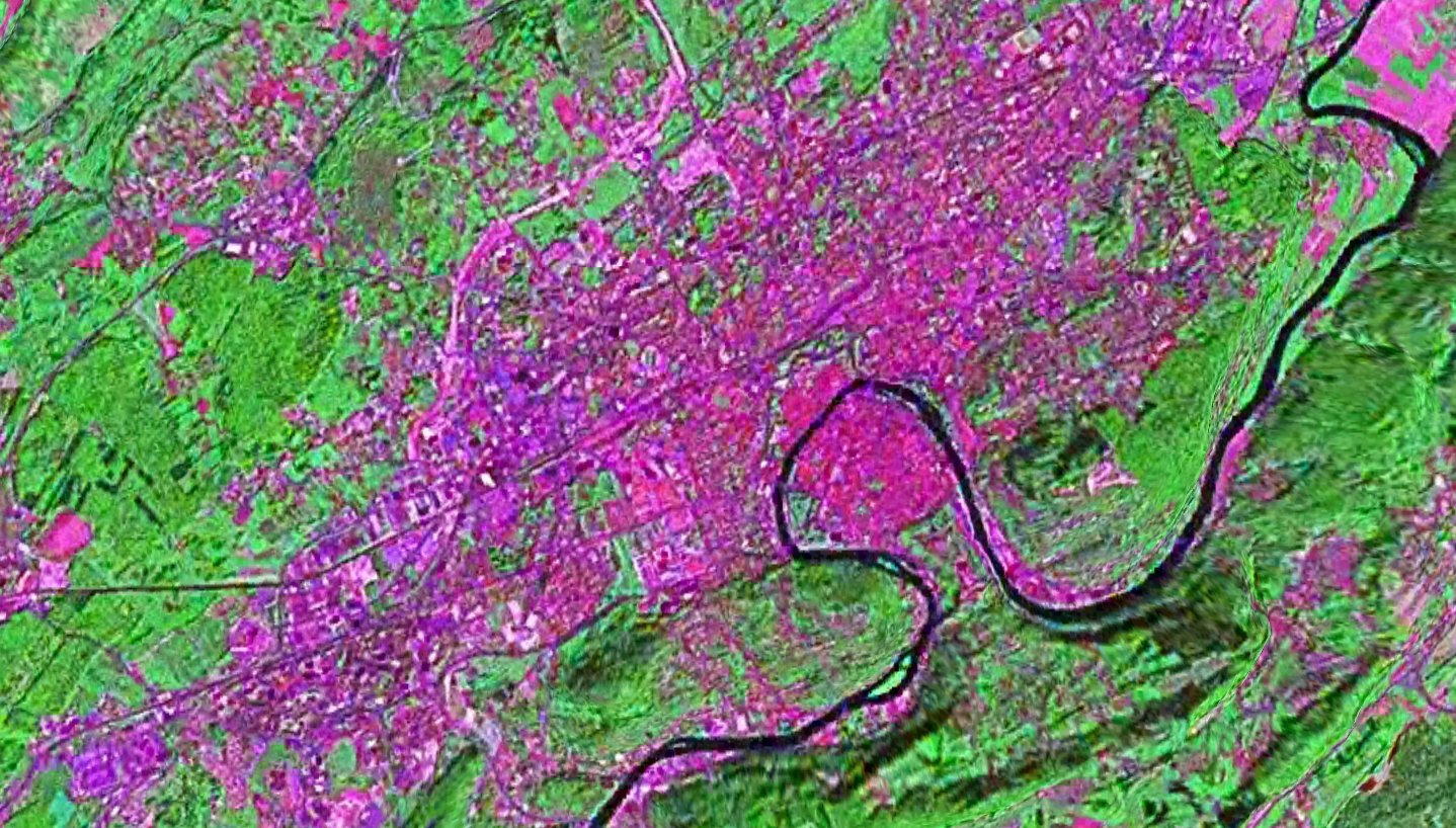 Image satellite (Landsat 7) de Besançon issue du logiciel NASA WORLD WIND